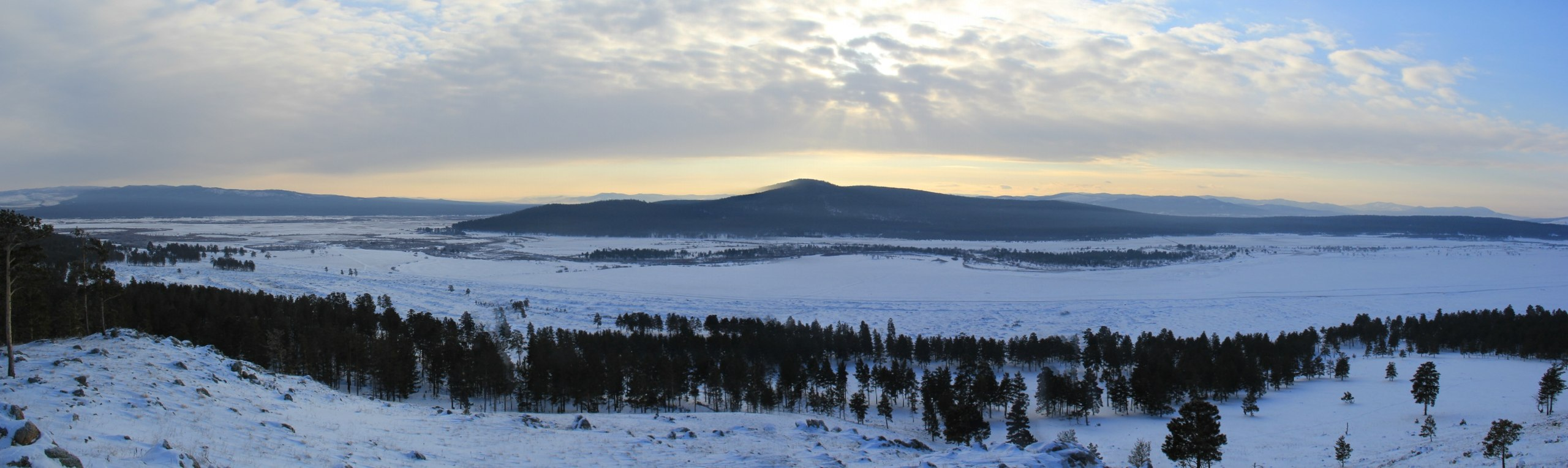 Вид на долину реки Уда с горы Дала-Гыр-Хан (юго-восточнее с. Хоринск)